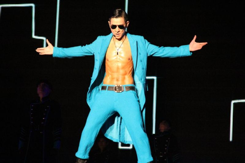 刘德华2011年4月30日天津演唱会现场图